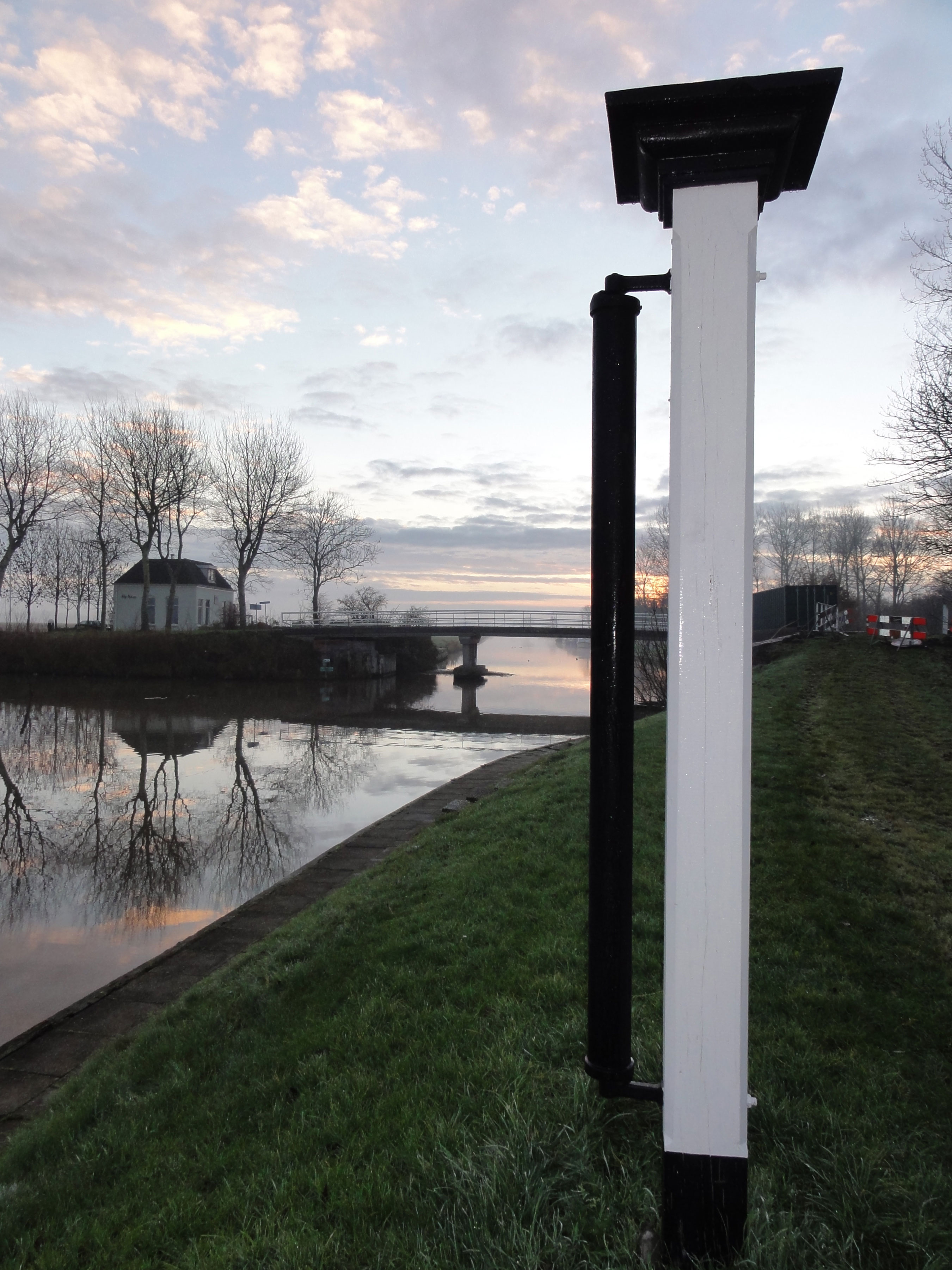 Rolpaal aan het Hunsingokanaal bij Op Stee